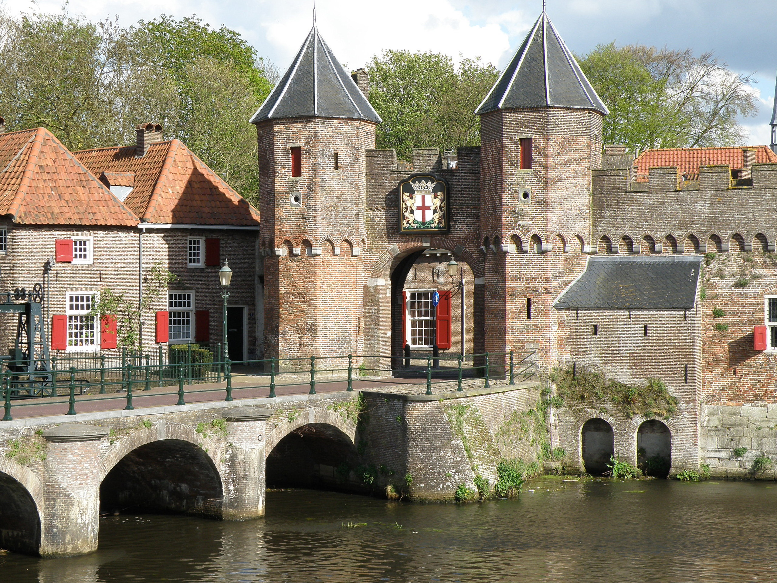 Amersfoort (prov. Utrecht, Nederland). Koppelpoort, veldzijde.